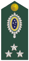 Vertical version of File:Insígnia de General de Divisão.gif